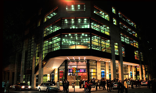 Auditorio Nacional Adela Reta